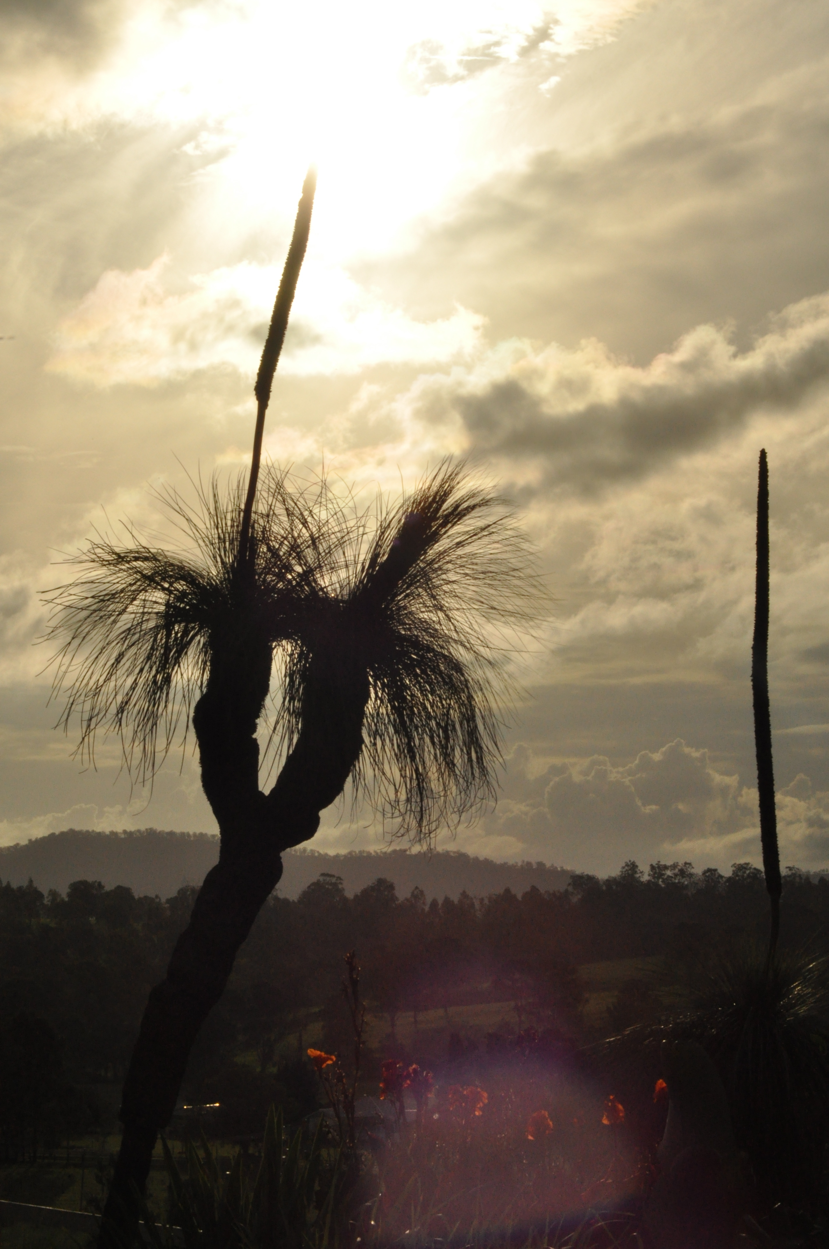 En plantas que han crecido en lugares sin obstrucción de la luz solar, se puede observar un crecimiento vertical (hacia arriba haciéndo un ánglo de 90º con respecto al suelo).